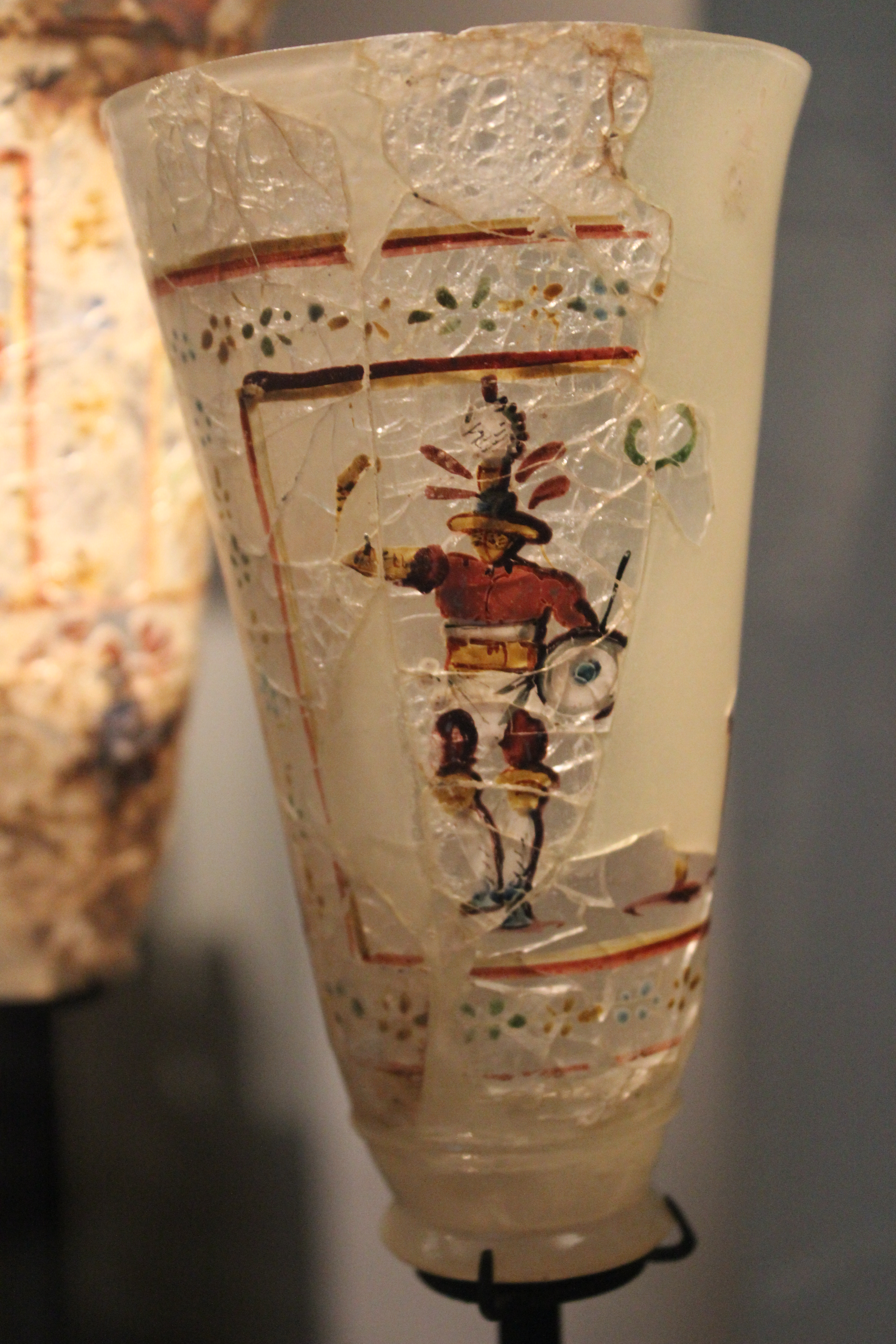 París, Musée Guimet. Tesoro de Bagram.